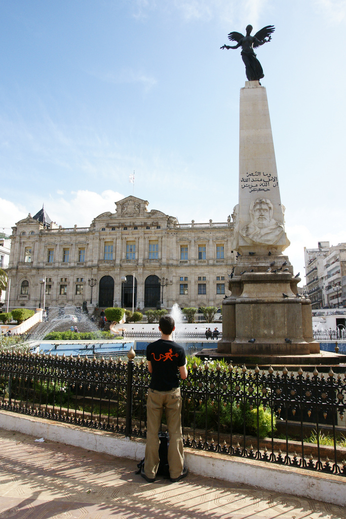 Hôtel de ville d'Oran (Algérie)